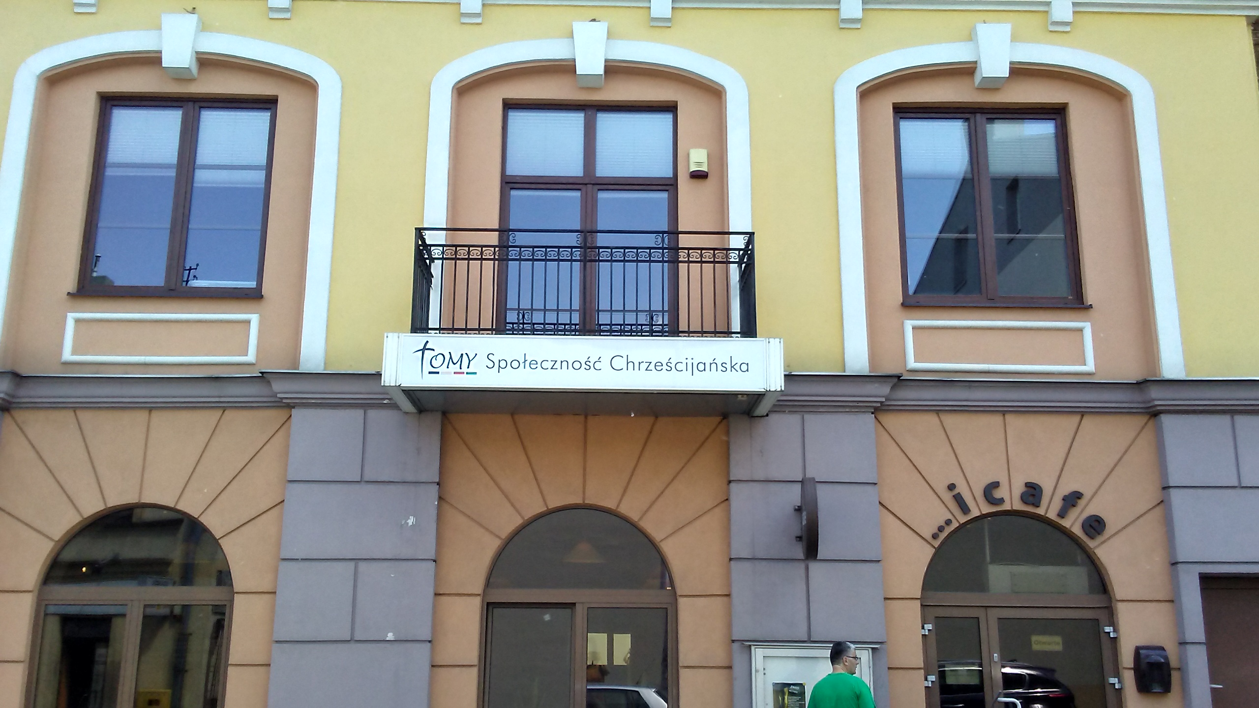 Społeczność chrześcijańska "Tomy" ul.: Jerozolimska